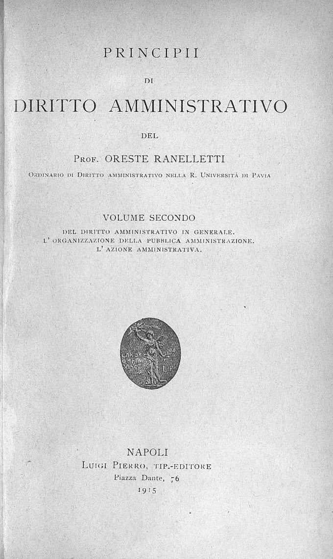 Frontespizio